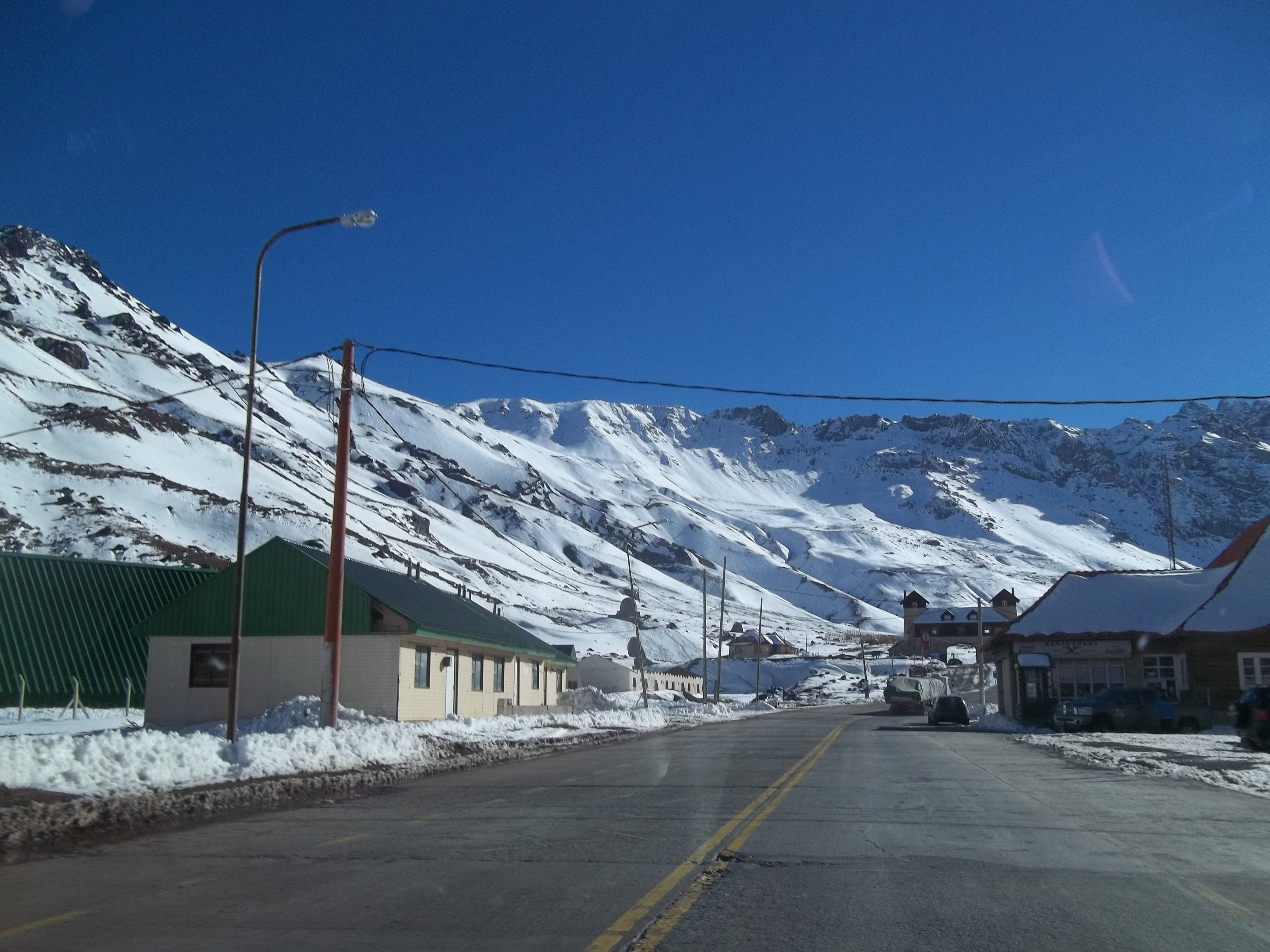 Ruta 7 en su paso por Las Cuevas